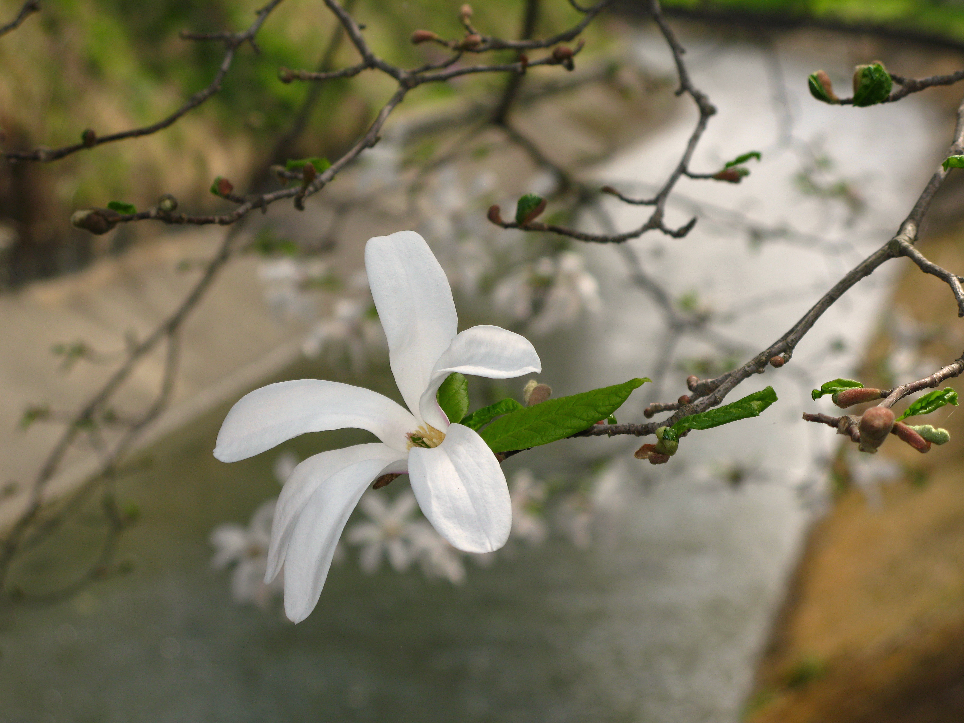 Magnolia, probably Magnolia kobus